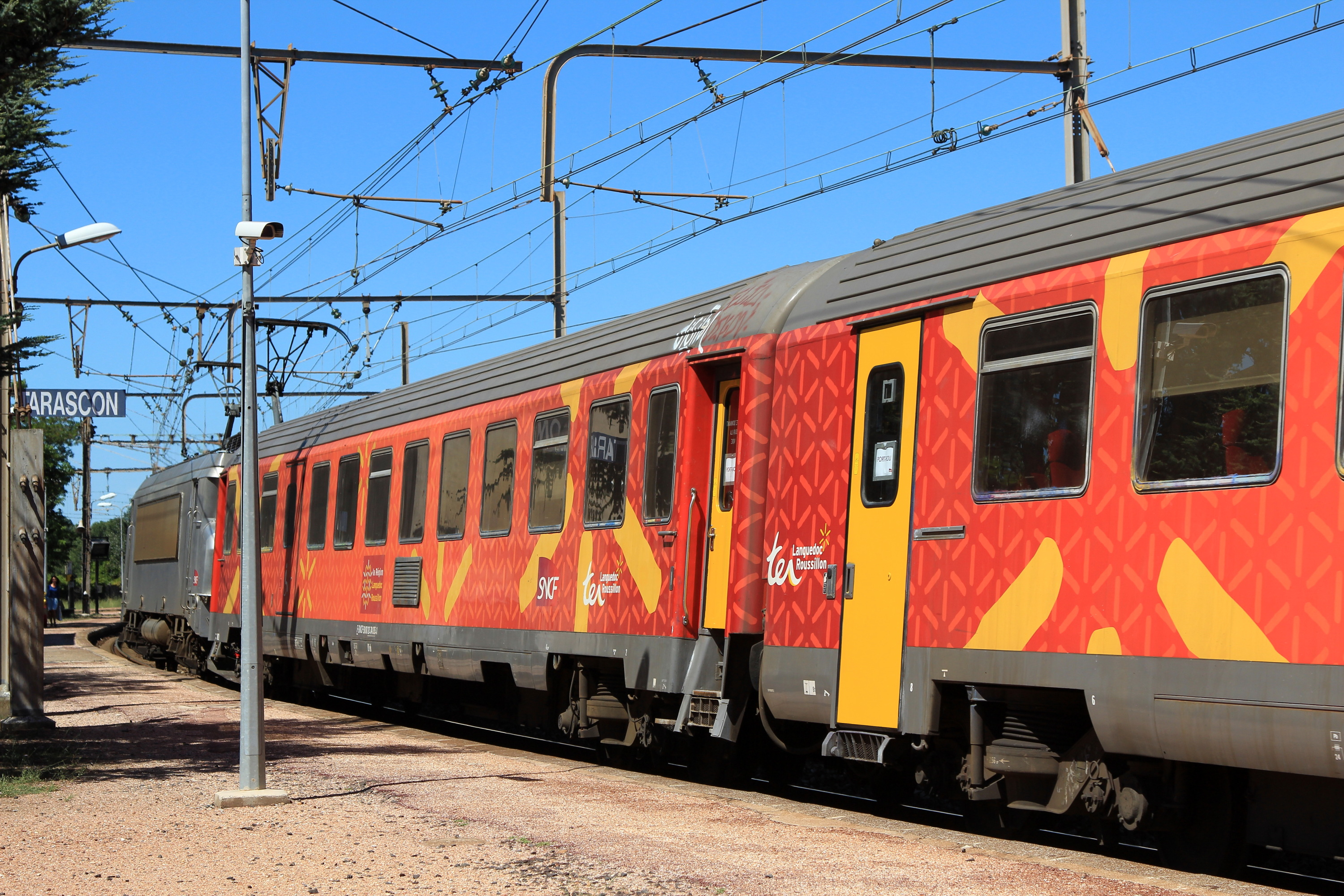 Le TER n°86985 Avignon - Port-Bou arrive en gare de Tarascon, assuré par une BB7200 en livrée fantôme et tirant des voitures Corail Languedoc-Roussillon.